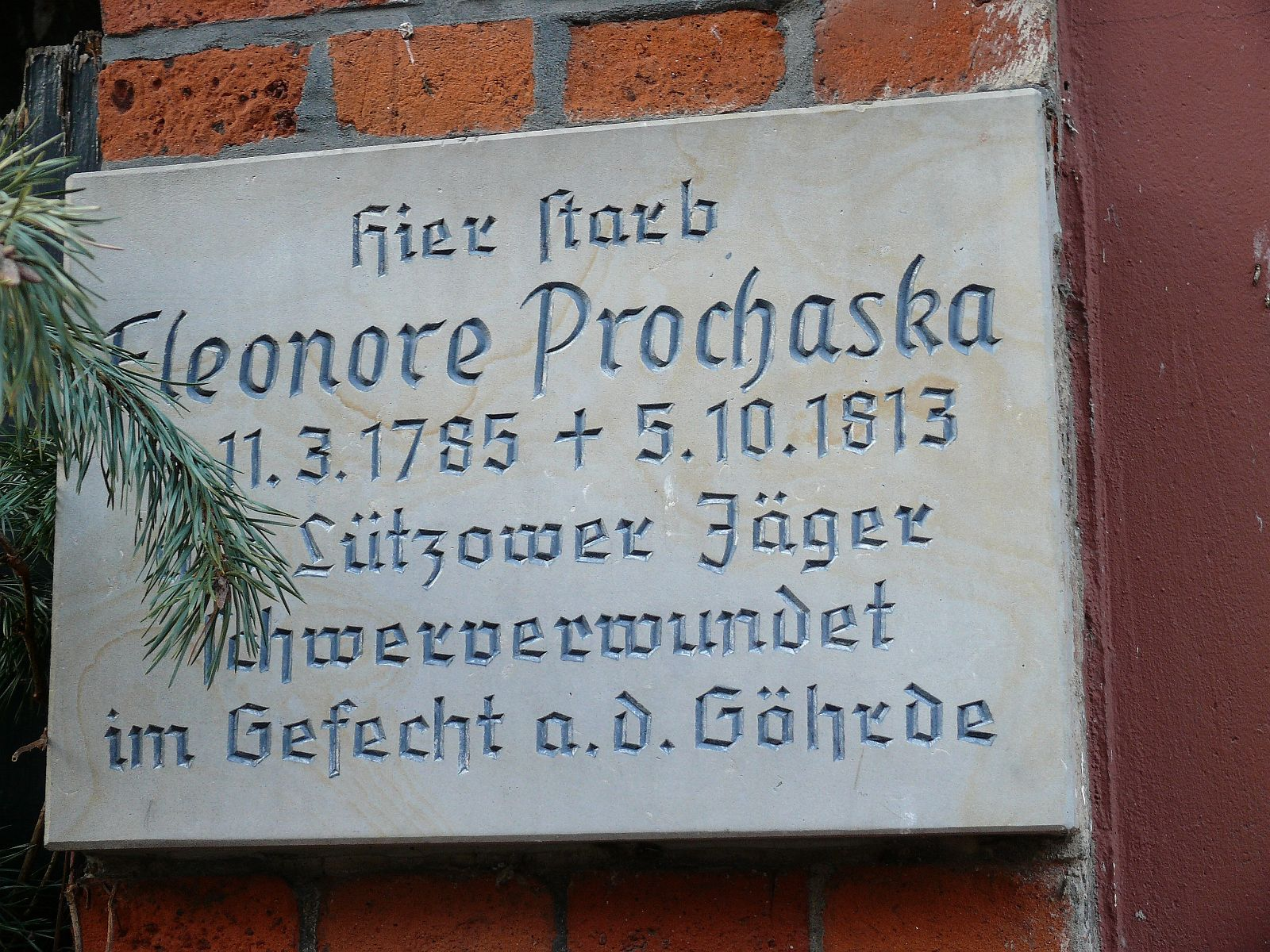 Gedenktafel zu Ehren von Eleonore Prochaska in der Langen Straße in Dannenberg (Elbe).